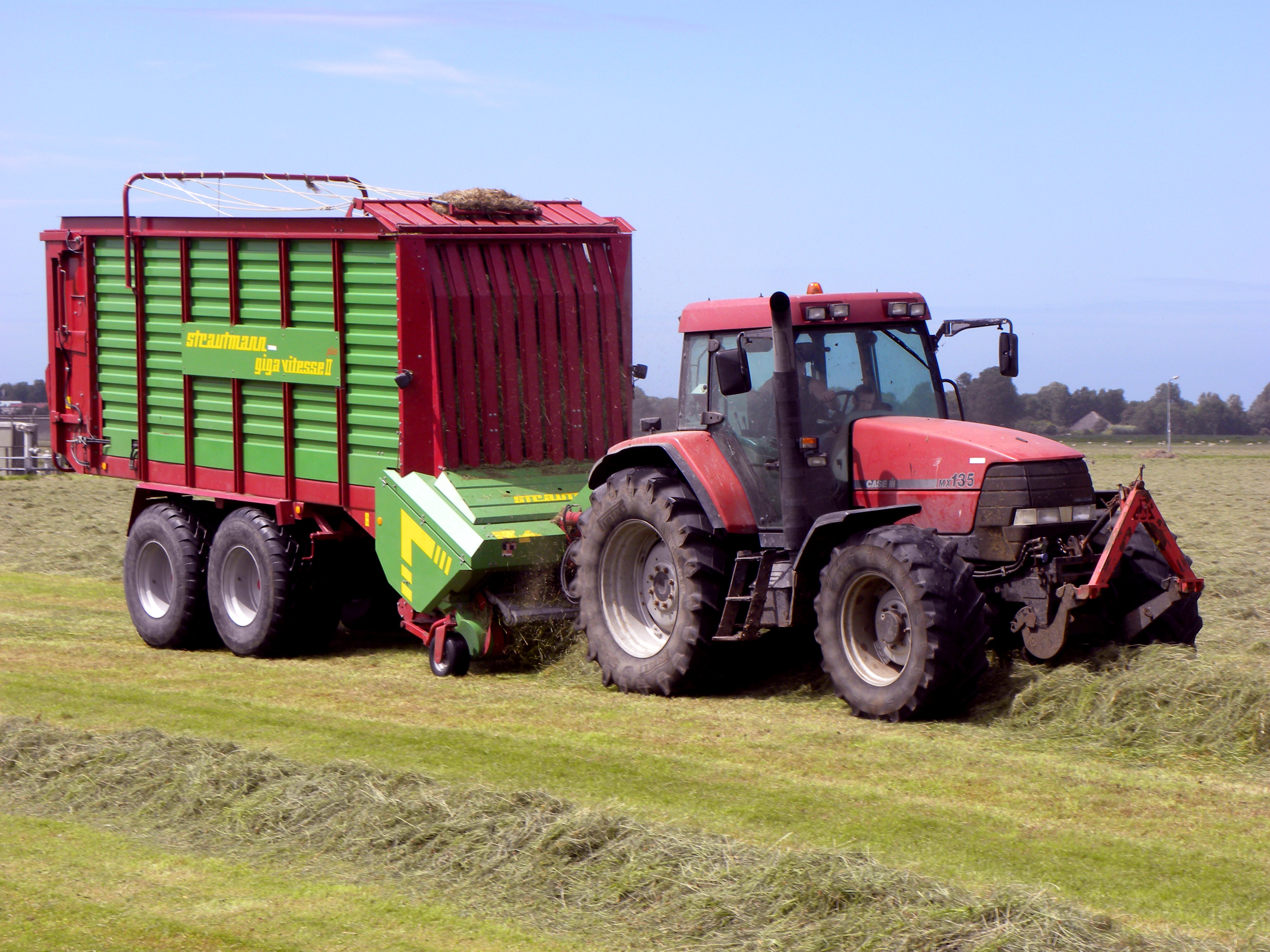 Case-IH-Traktor MX135 mit Weiste-Dreieck am Fronthubwerk und Strautmann-Kurzschnittladewagen Giga vitesse II